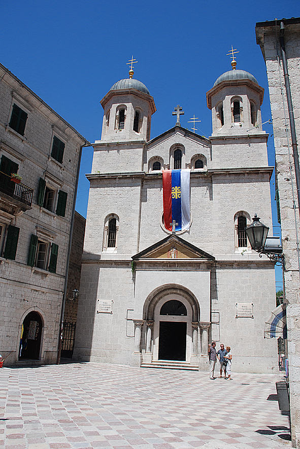 Котор